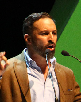 Acto de Vox en Vistalegre